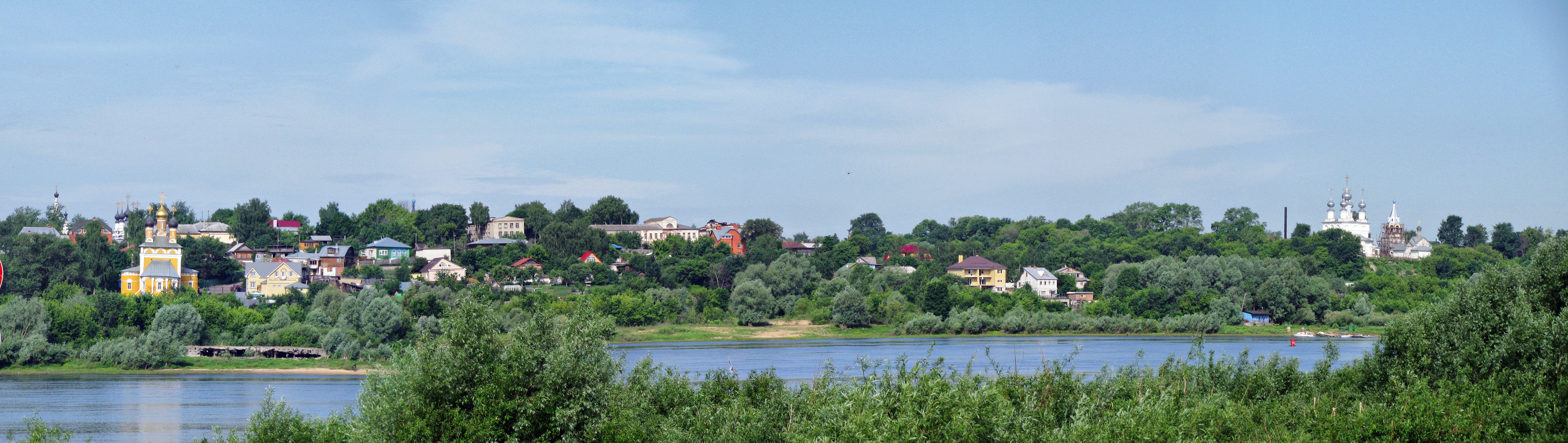 "Муромские купола"